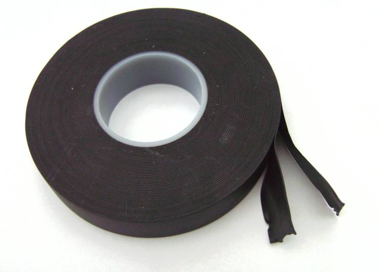 Selbstverschweißendes Isobutylen-Dichtungsband